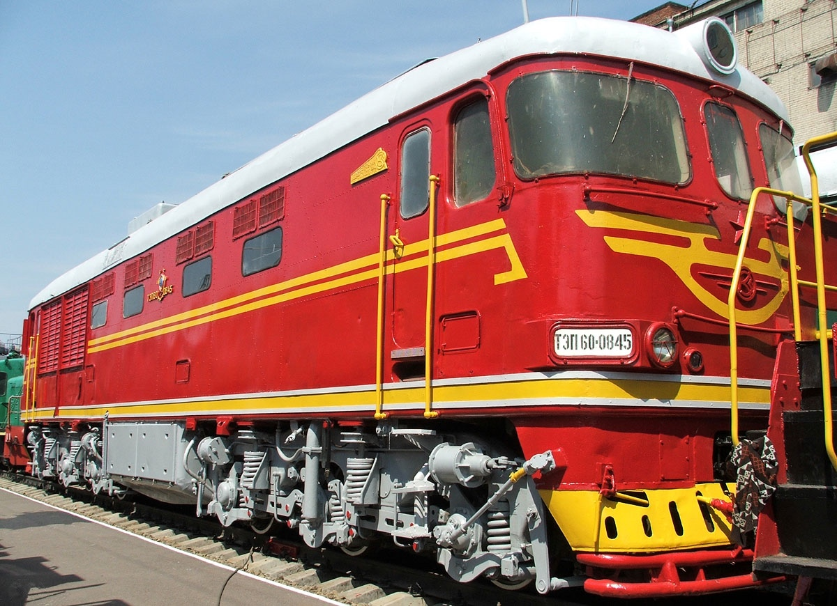 Ростовский музей железнодорожного транспорта СКЖД